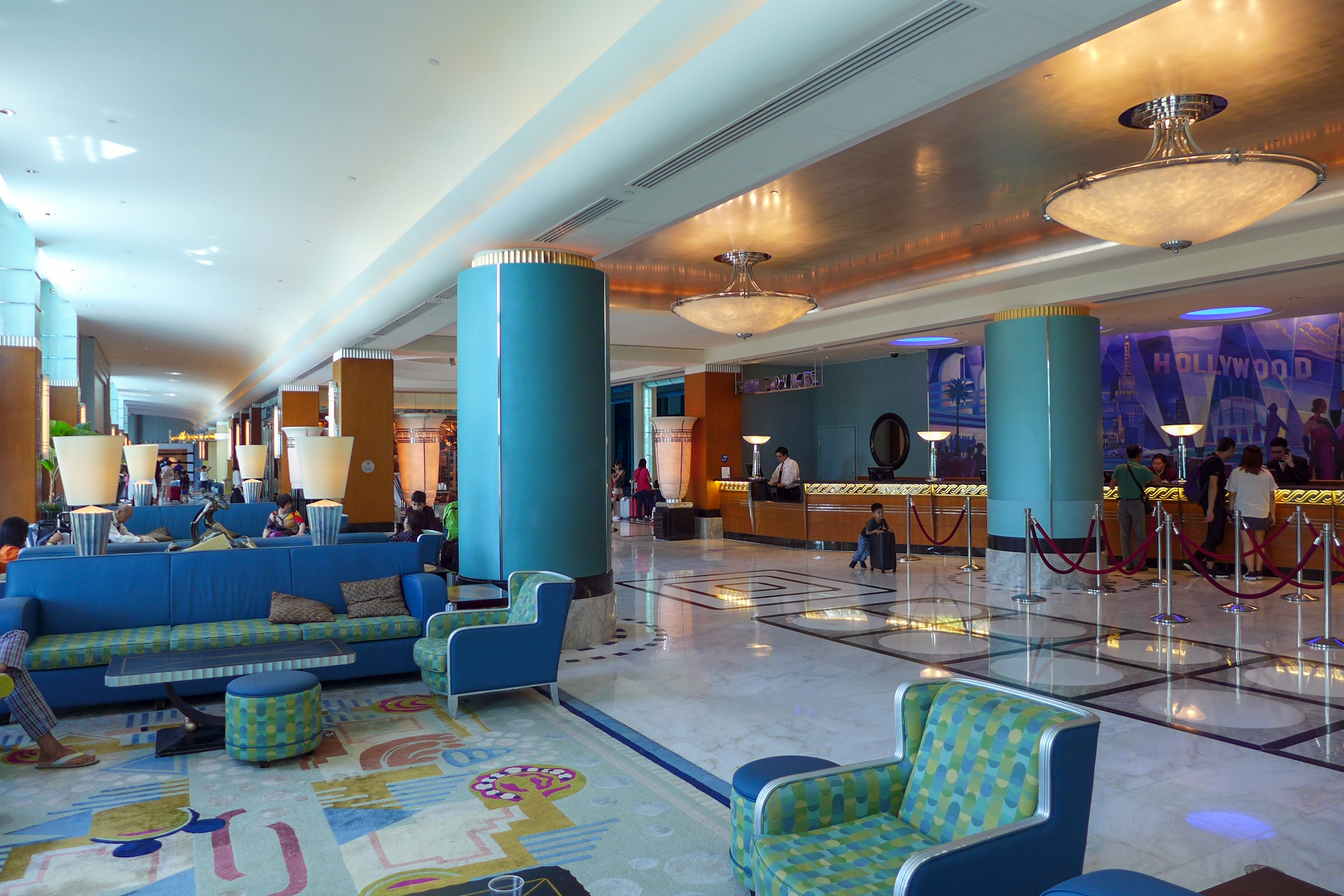 Disneyland Hollywood Hotel